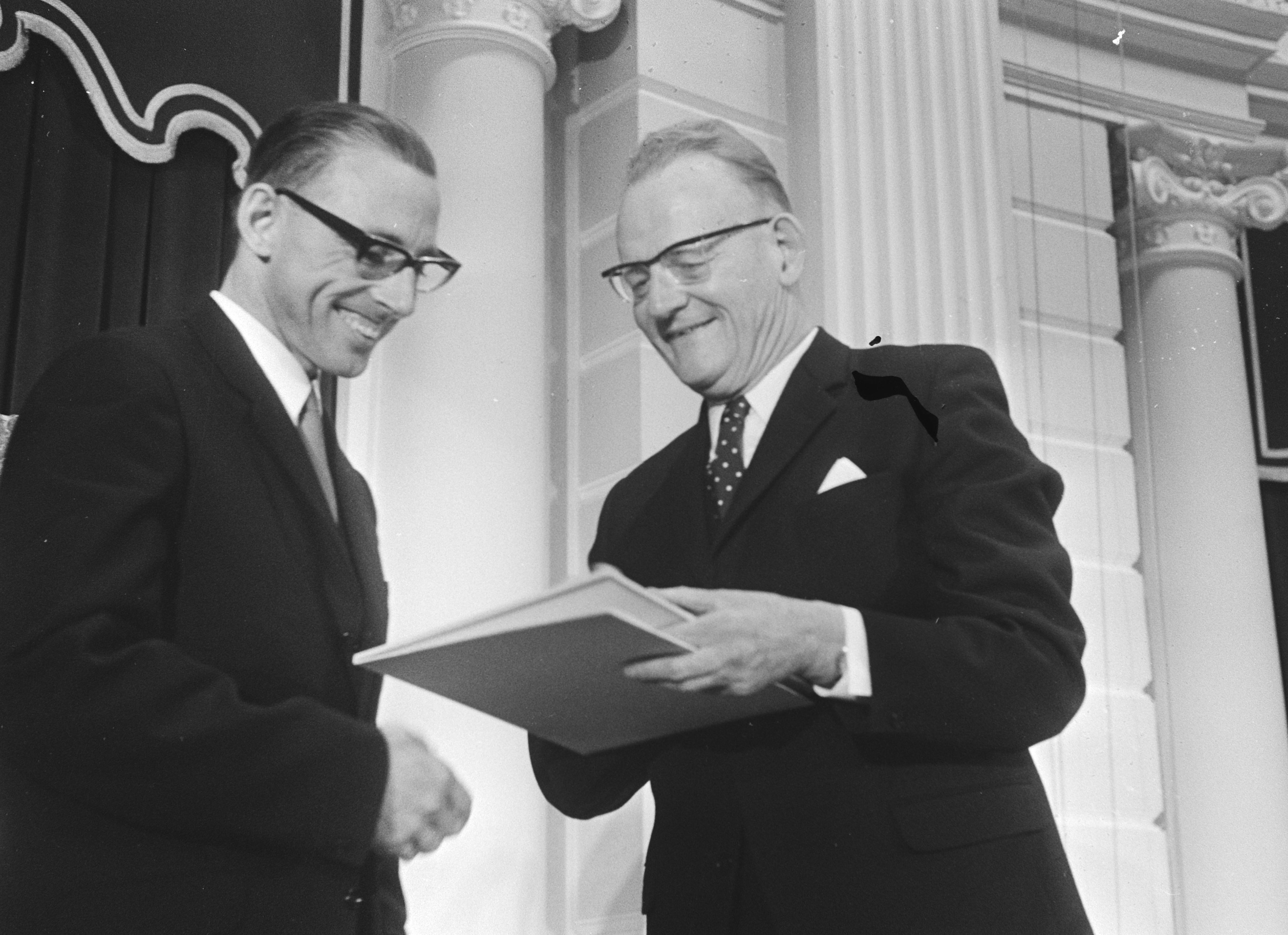 De uitreiking van de Albert Schweitzerprijs 1971. Pater Jan de Vries (links; geb. ca. 1930) krijgt de prijs van prof.dr. K.A.H. Hidding voor zijn werk in Mahaus (Brazilië). (Plaats: Concertgebouw, Amsterdam)